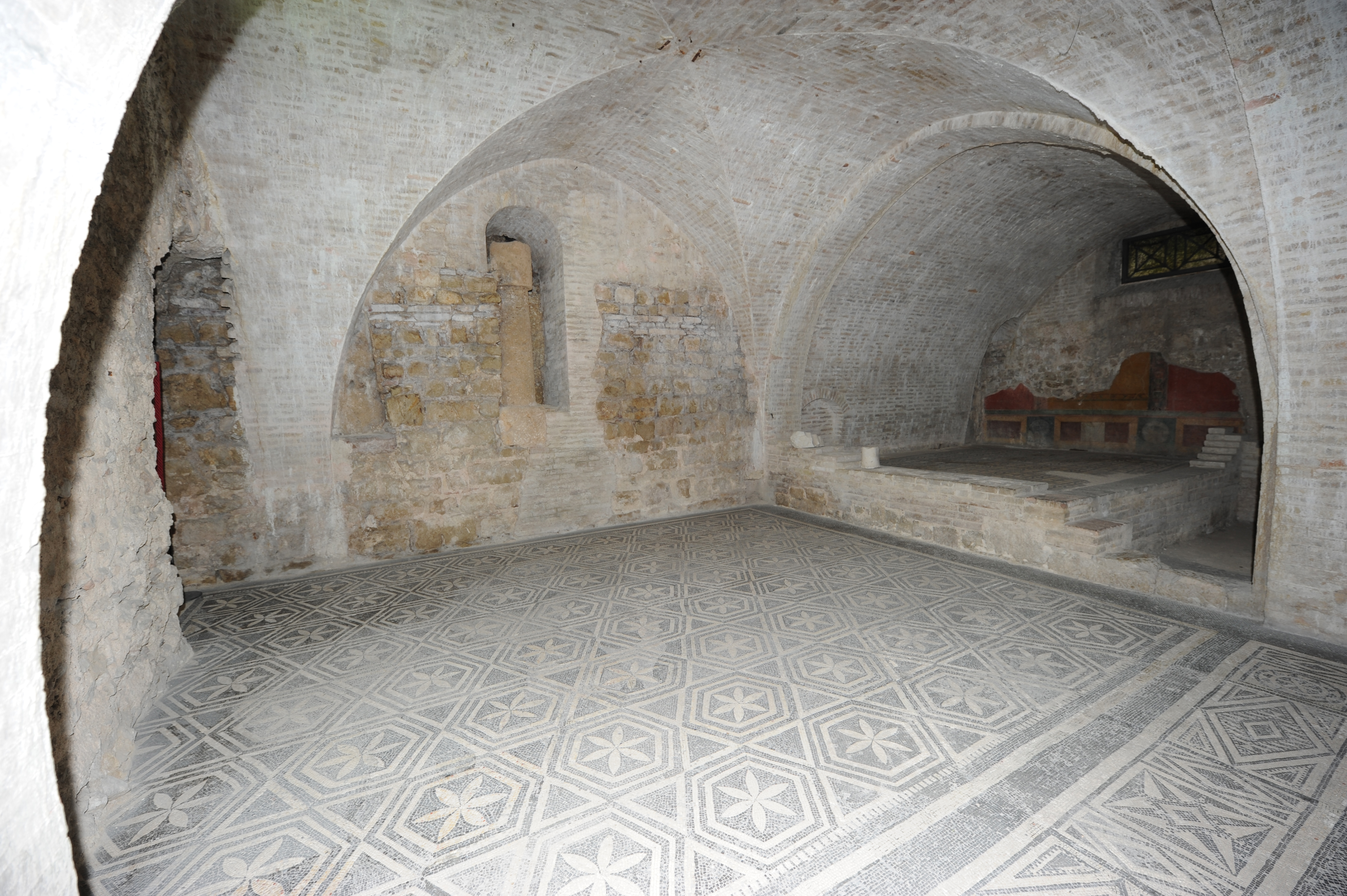 Tablino